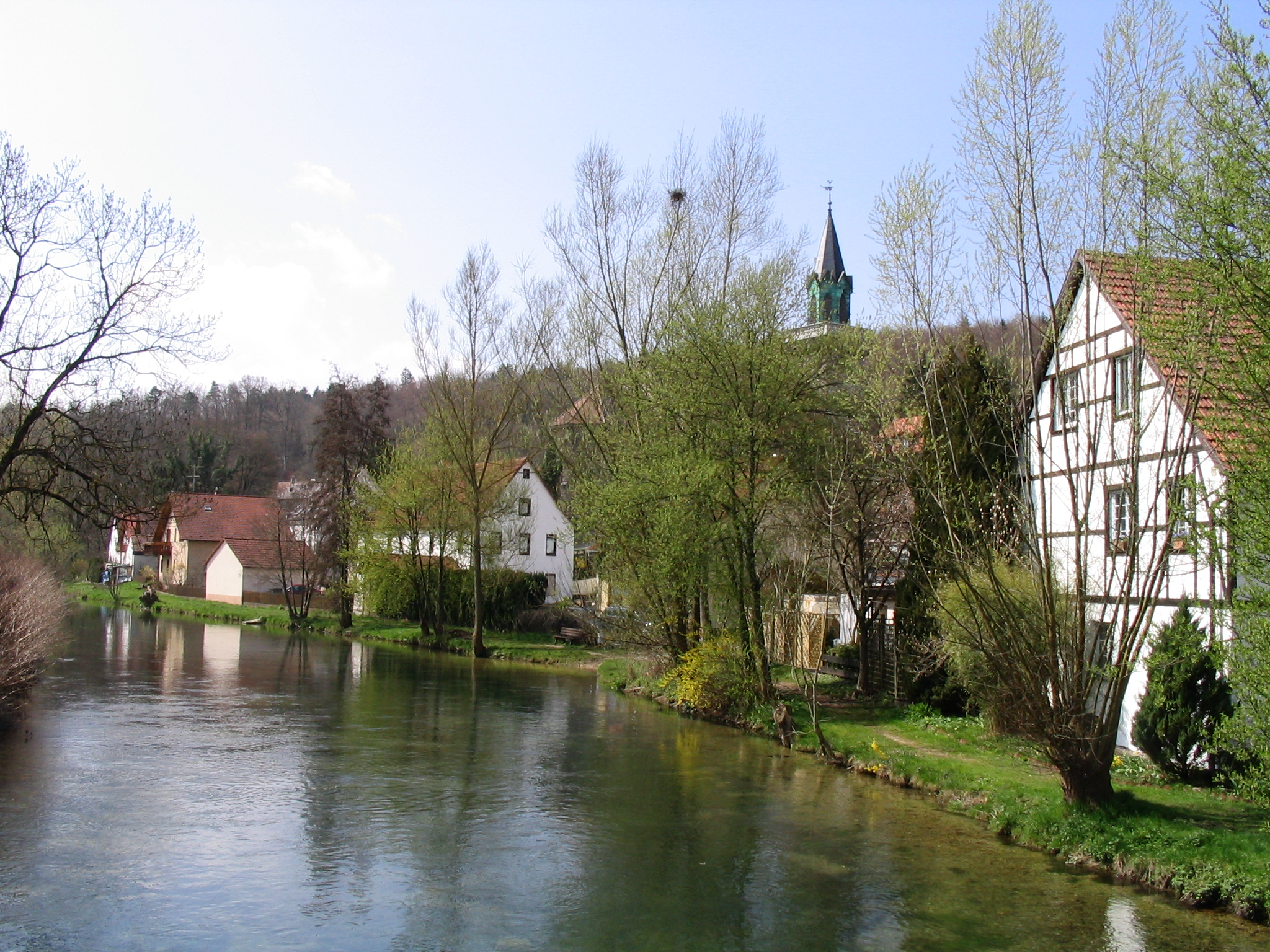 idyllisches Brenzufer mit Kirche im Hintergrund